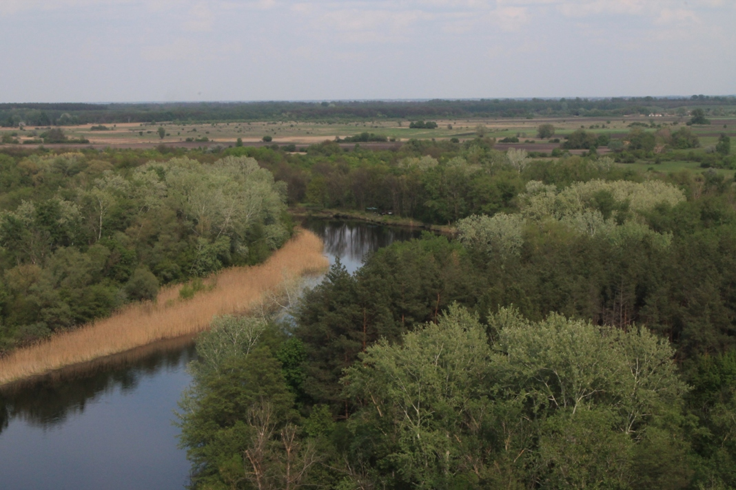 Природа Перегонівки